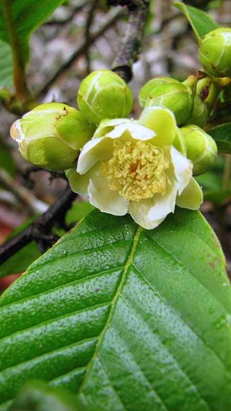 Tetracera boomii G. Aymard C.